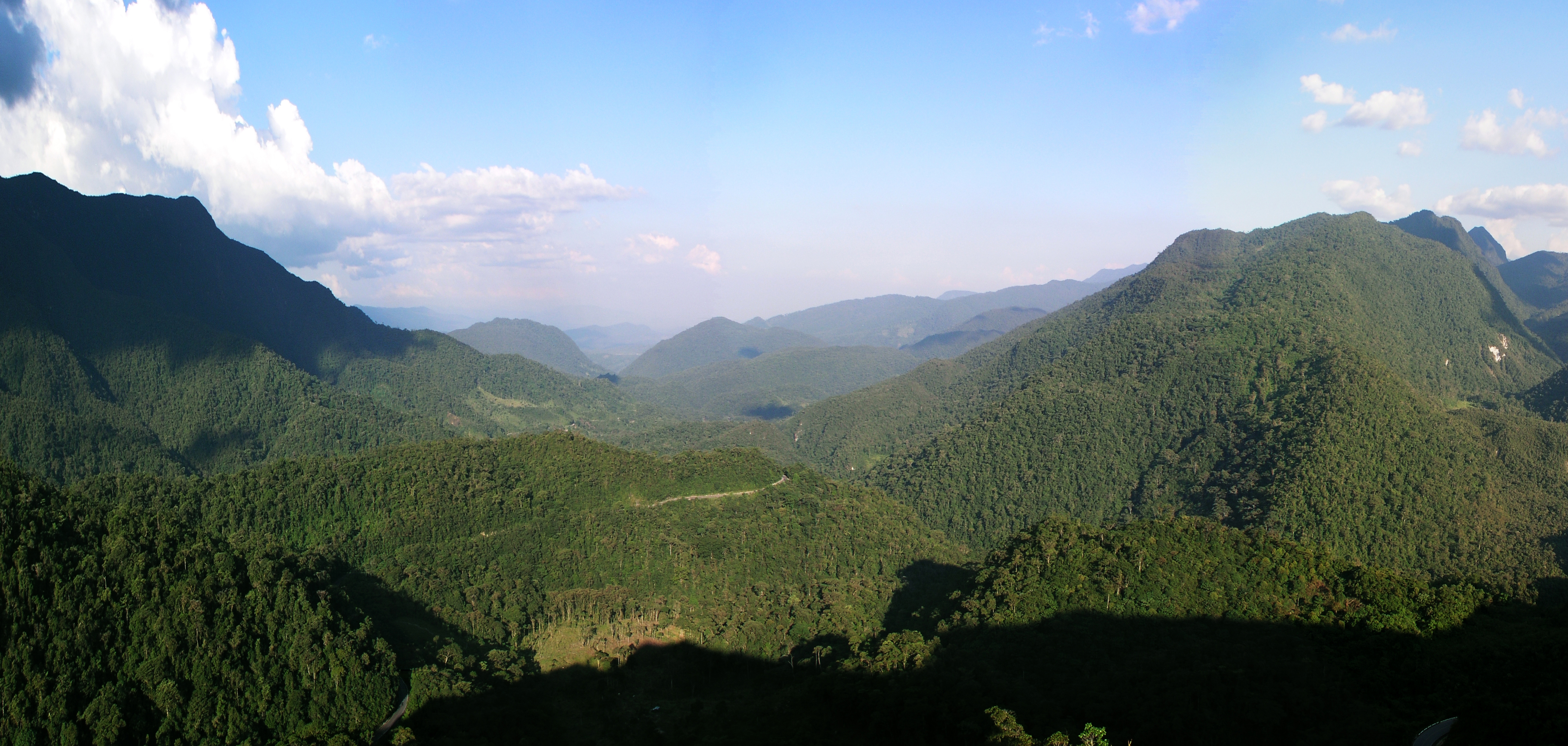 Vue sur le massif Alto Mayo depuis le col Abra Patricia (San Martin, Pérou).